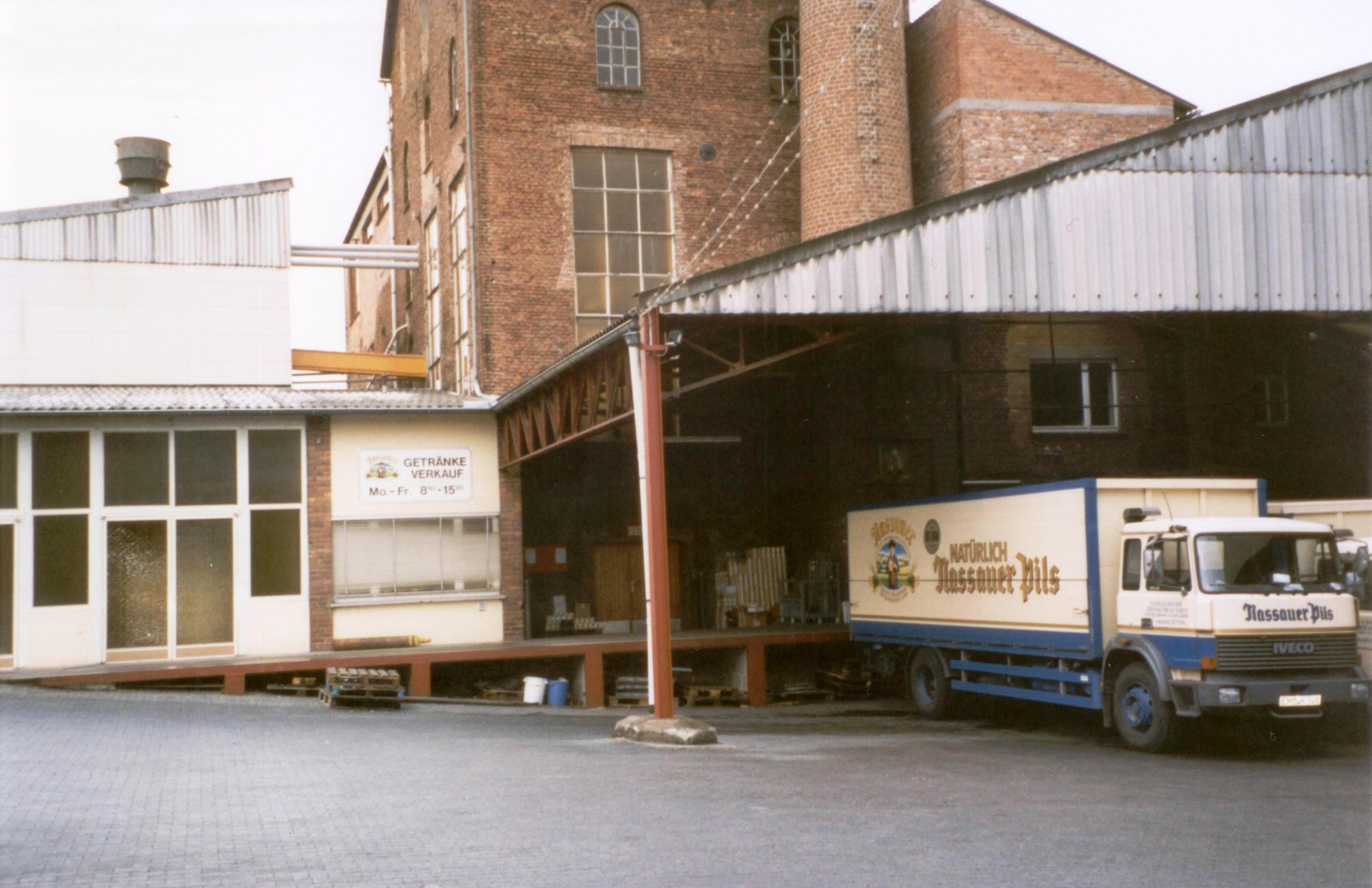 Nassauische Privatbrauerei Rampe 1994